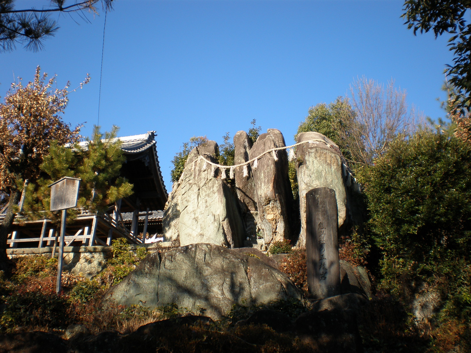 愛知県小牧市の熊野神社内にある五枚岩